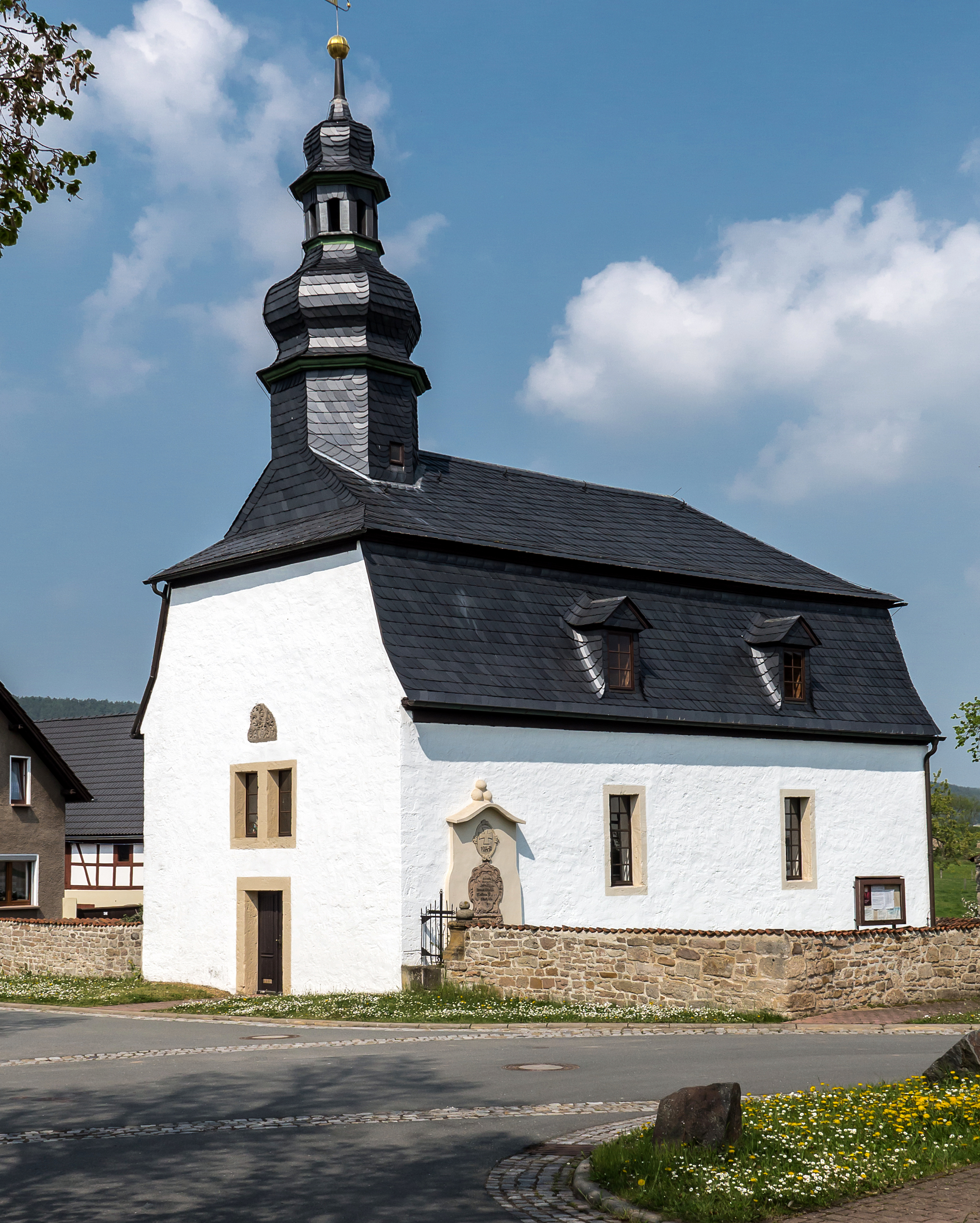 Westansicht